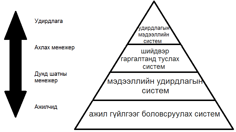 Монгол: 4түвшин